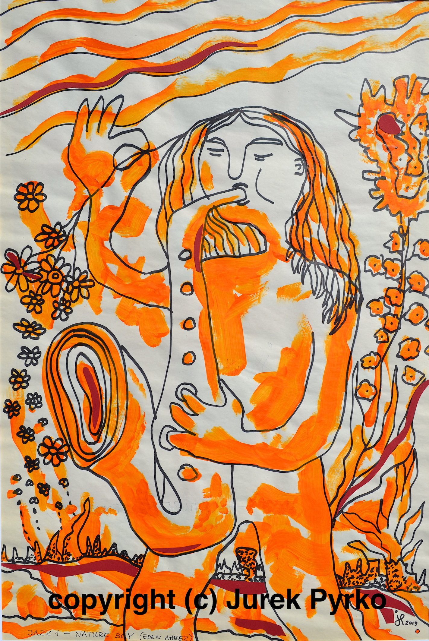 akryl-tusch-papper